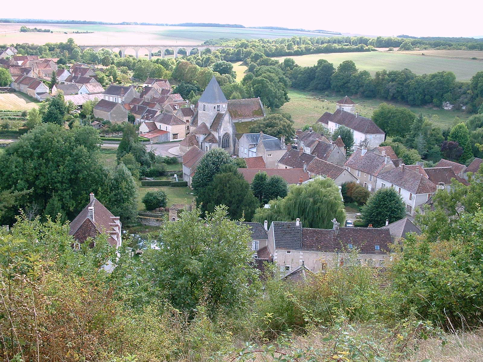 Druyes-les-belles-Fontaines, Yonne) - vue depuis le château